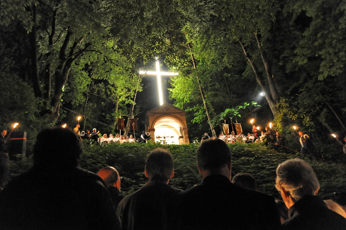 Bilder von der Lichterprozession zum Kreuzberg Weingarten 2012 Personality rights warningAlthough this work is freely licensed or in the public domain, the person(s) shown may have rights that legally restrict certain re-uses unless those depicted consent to such uses. In these cases, a model release or other evidence of consent could protect you from infringement claims.